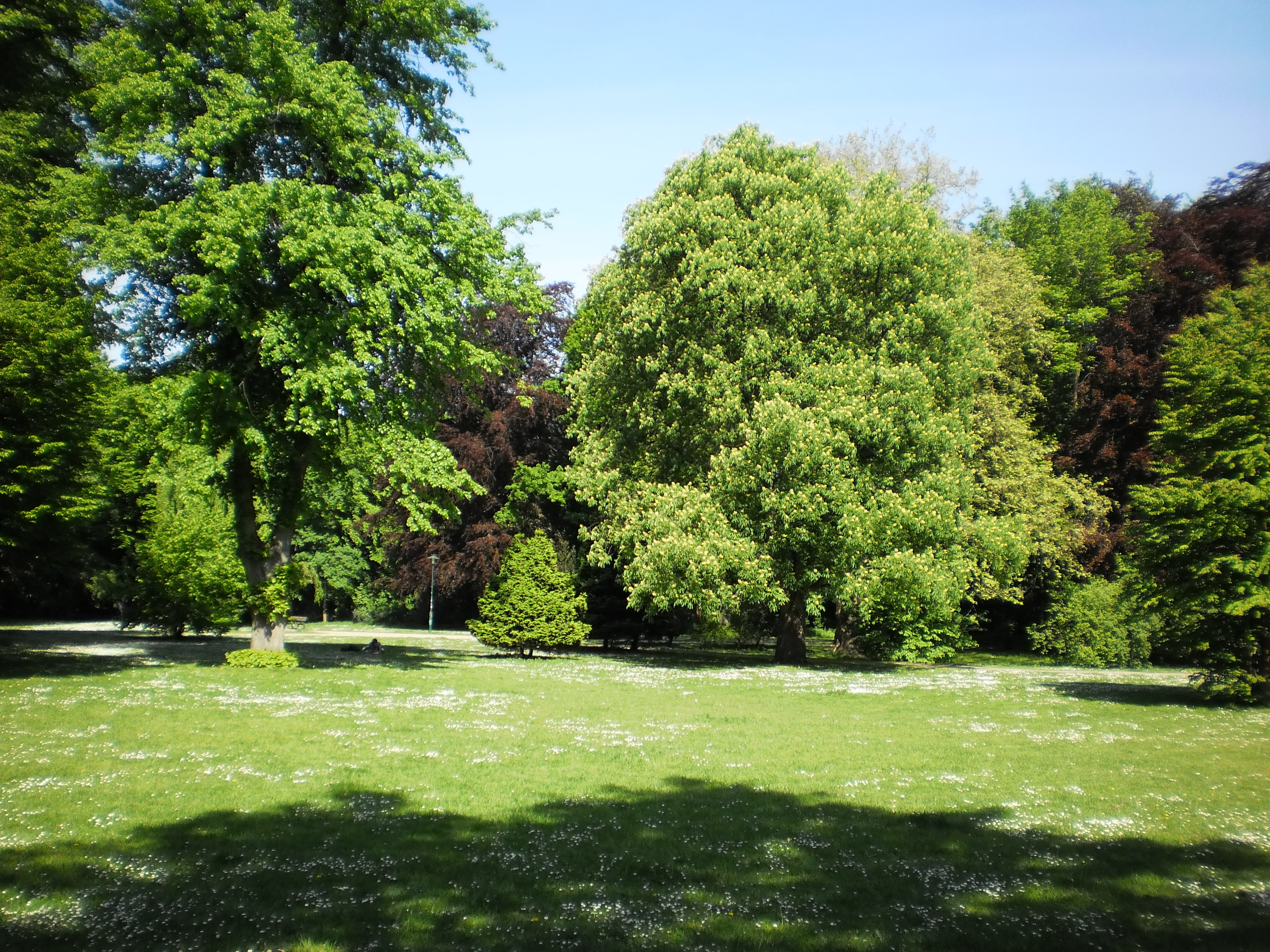 Der Renckspark NMS vom Spielplatz aus